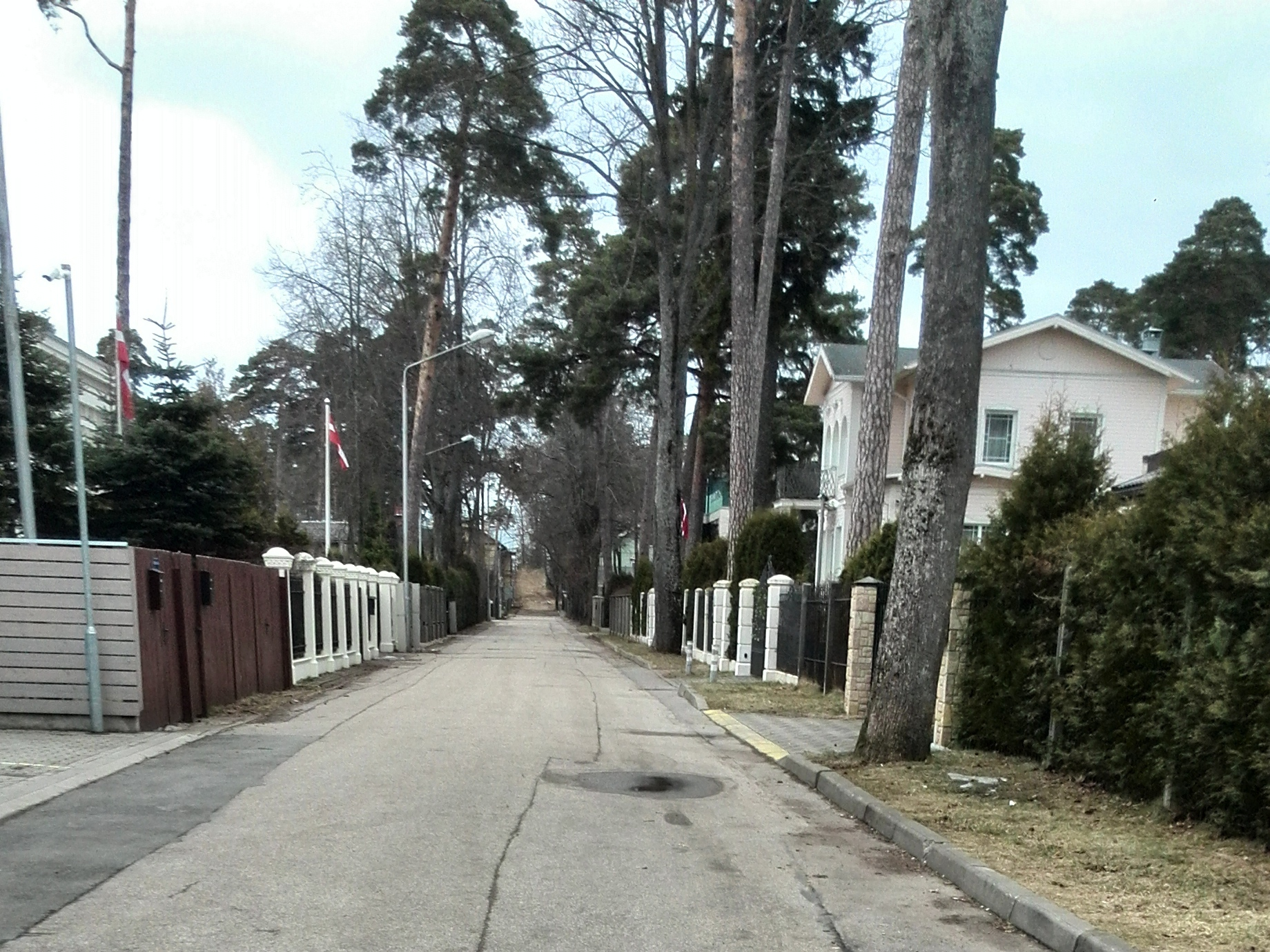 Kaudzīšu iela, Jūrmala